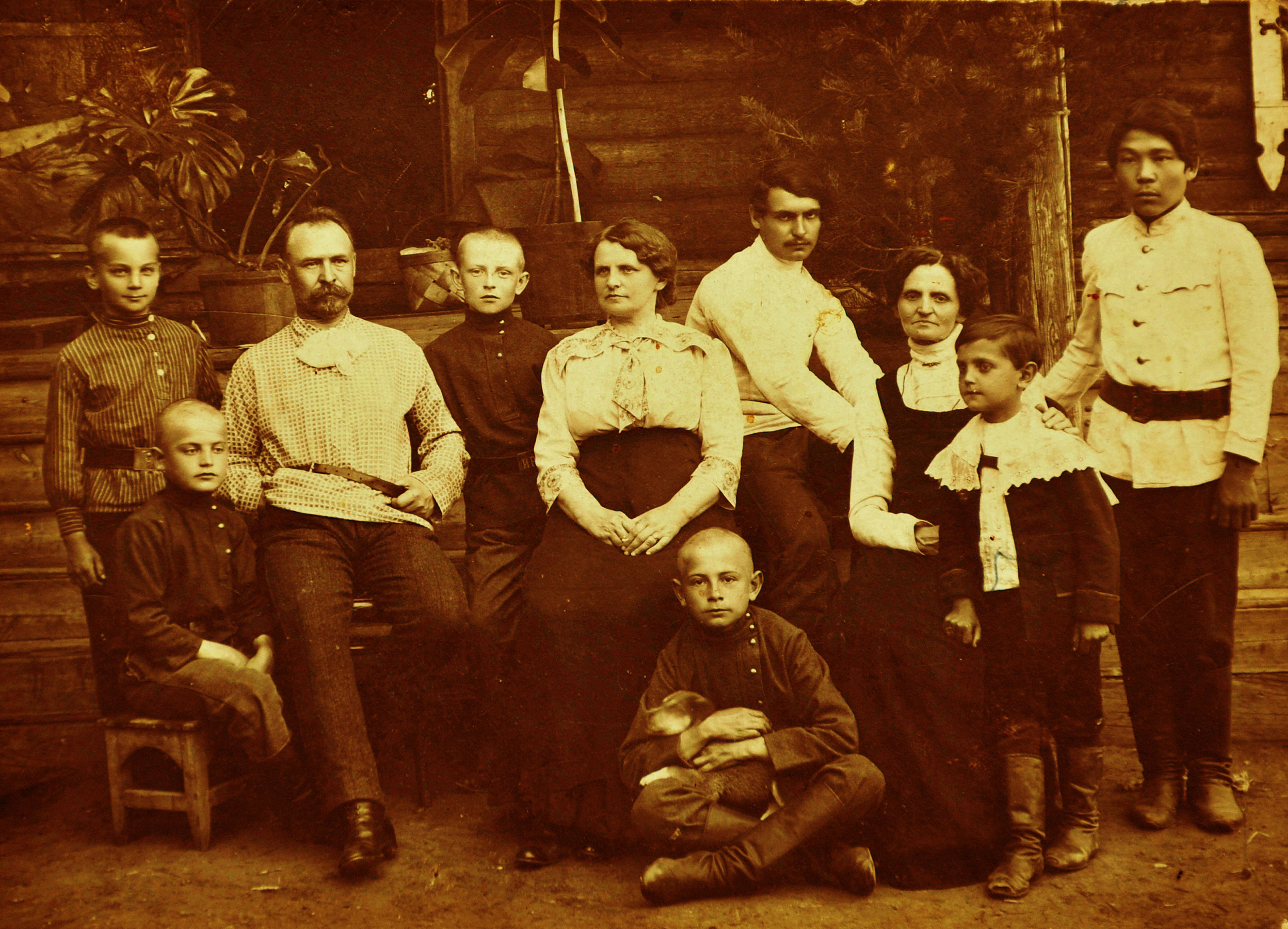 Шесть детей и четыре взрослых семьи Гущо Семейная фотография 1914 года. Справа налево: приемный сын (имя неизвестно), Генрих Гущо, Ядвига Валериановна Гущо, Бронислав Матвеевич Гущо, Антоний Гущо, Эмилия Казимировна Гинтовт-Дзевялтовская, Владислав Гинтовт-Дзевялтовский, Станислав Валерианович Гинтовт-Дзевялтовский, Наполеон-Карл Гинтовт-Дзевялтовский, Петр Гущо. Фотография из личного архива Ю.П.Гущо.